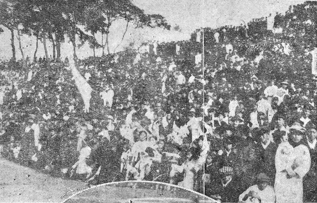 1923년 전국체육대회 축구(제4회 전조선축구대회) 종목 제3일차 관중 모습.